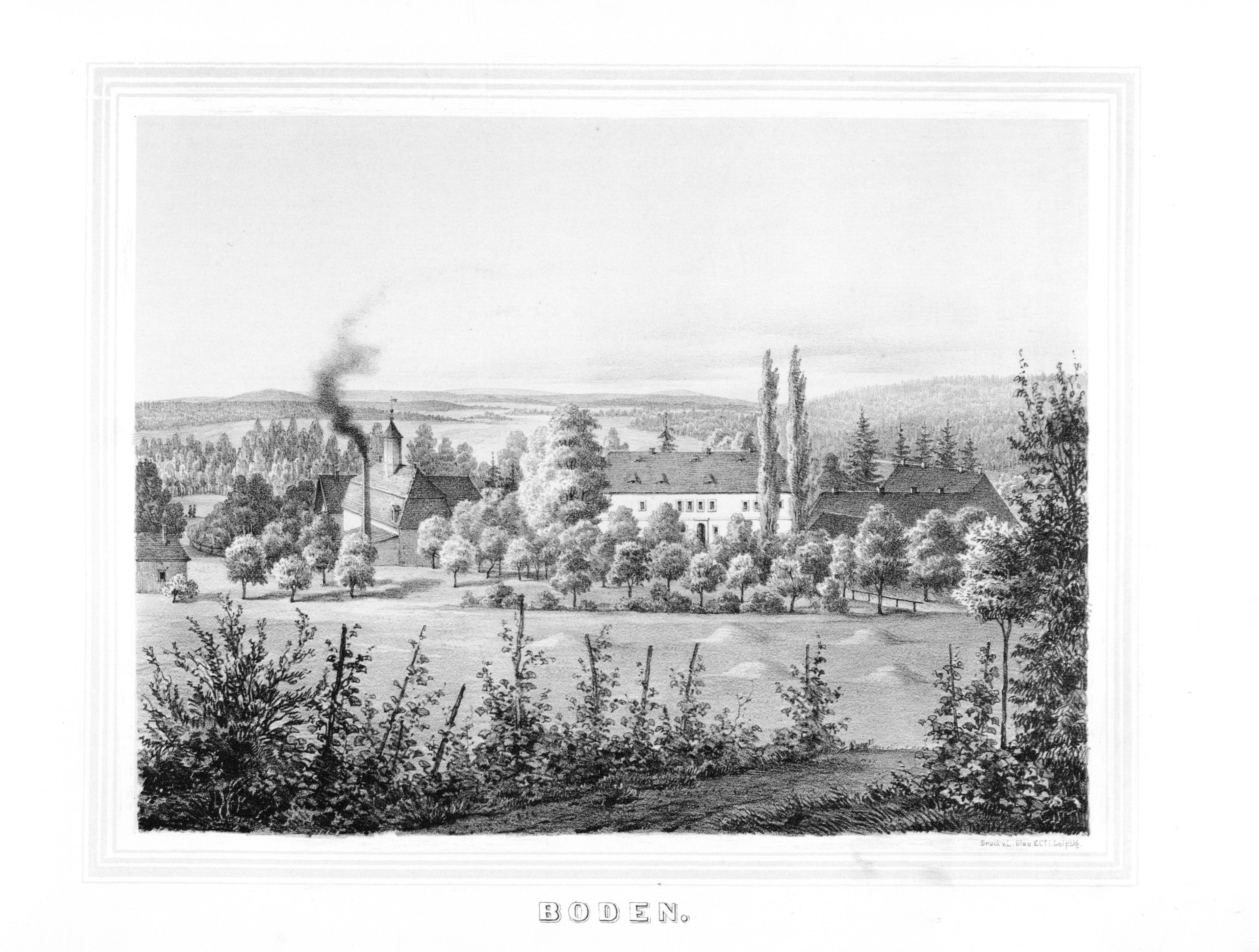 Boden aus: Album der Rittergüter und Schlösser im Königreiche Sachsen Meissner Kreis Section: II